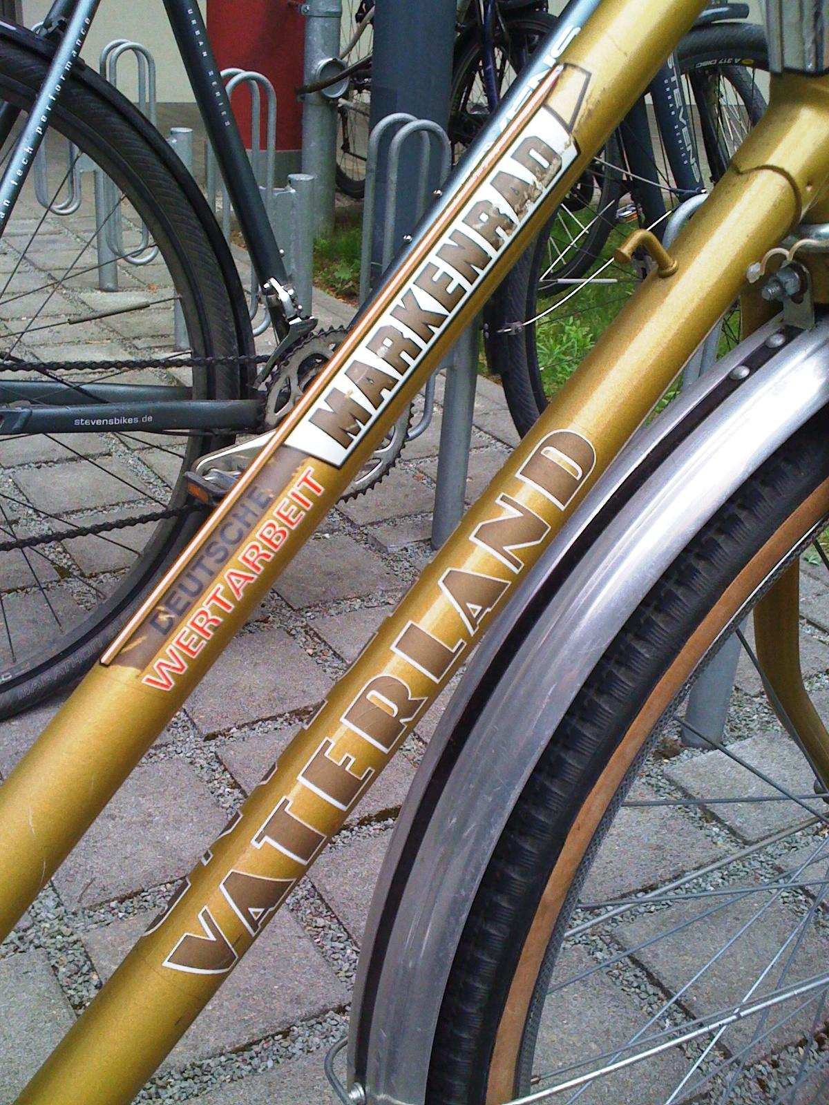 Darf man ein Rad fahren, das Vaterland heißt?